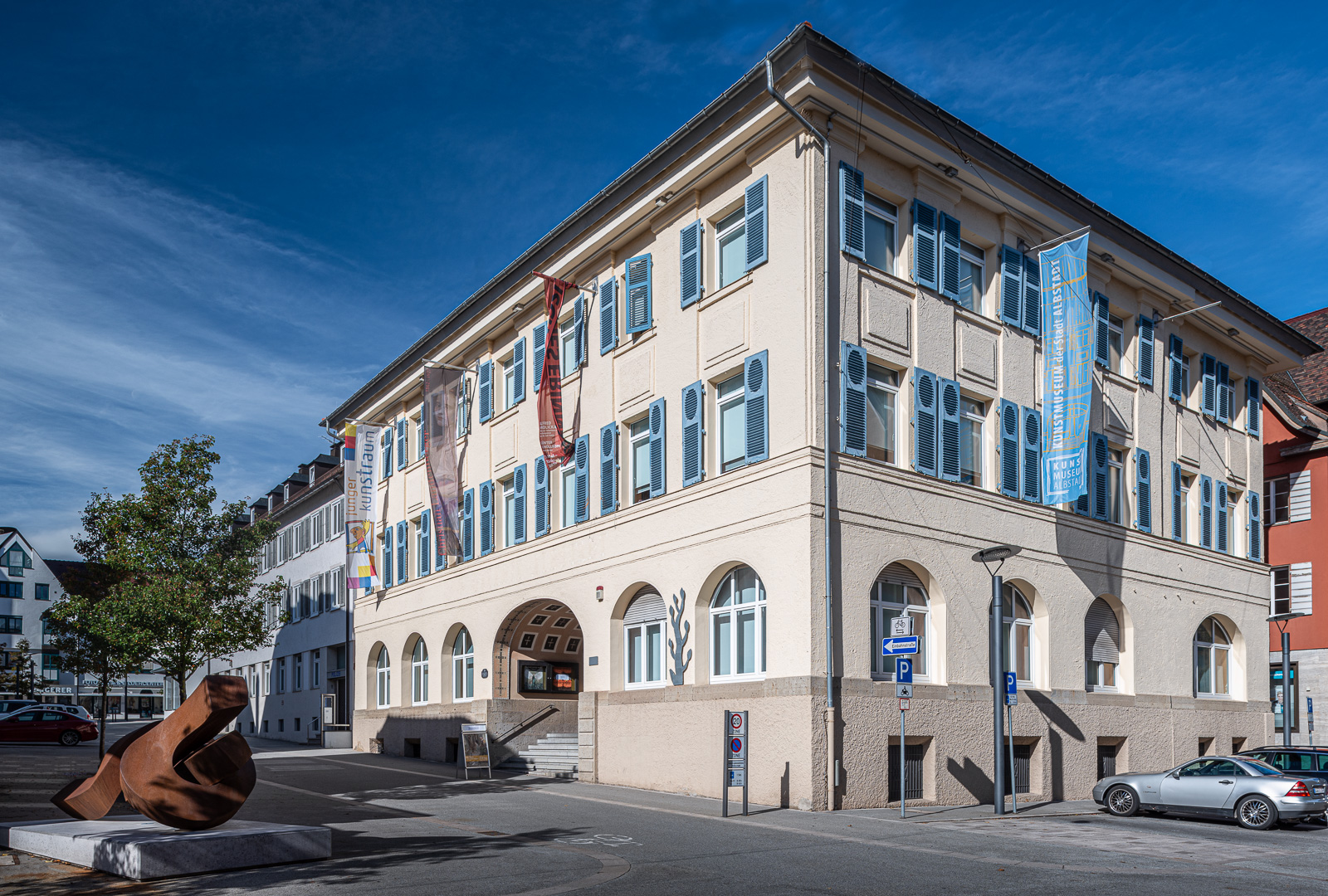 Kunstmuseum Albstadt. Im Vordergrund die Skulptur "Entwicklung" von Jörg Bach.